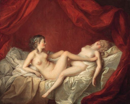 "Les Deux Amies" par Jean-Jacques Lagrenée (1739-1821).